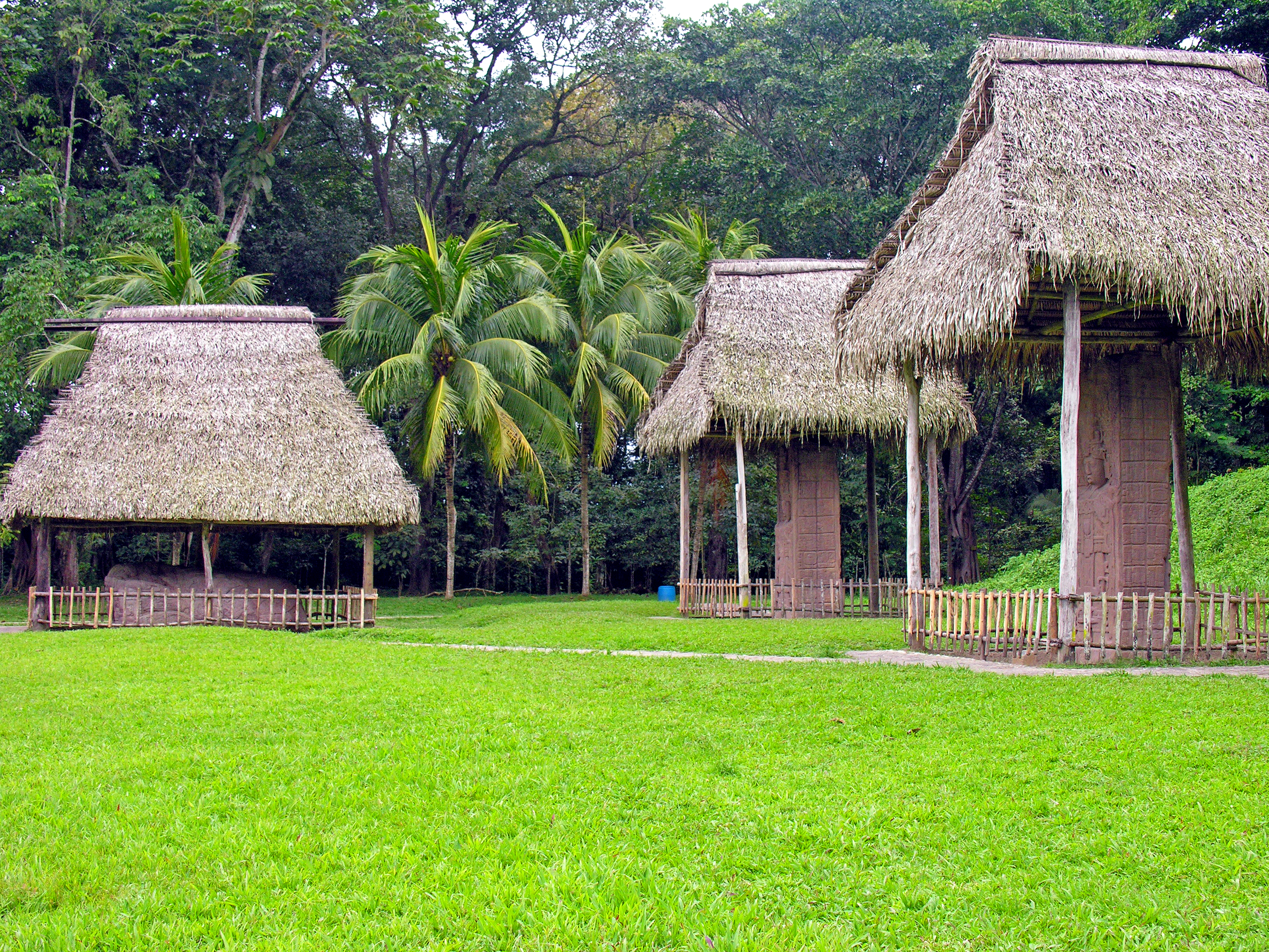 Guatemala-0580